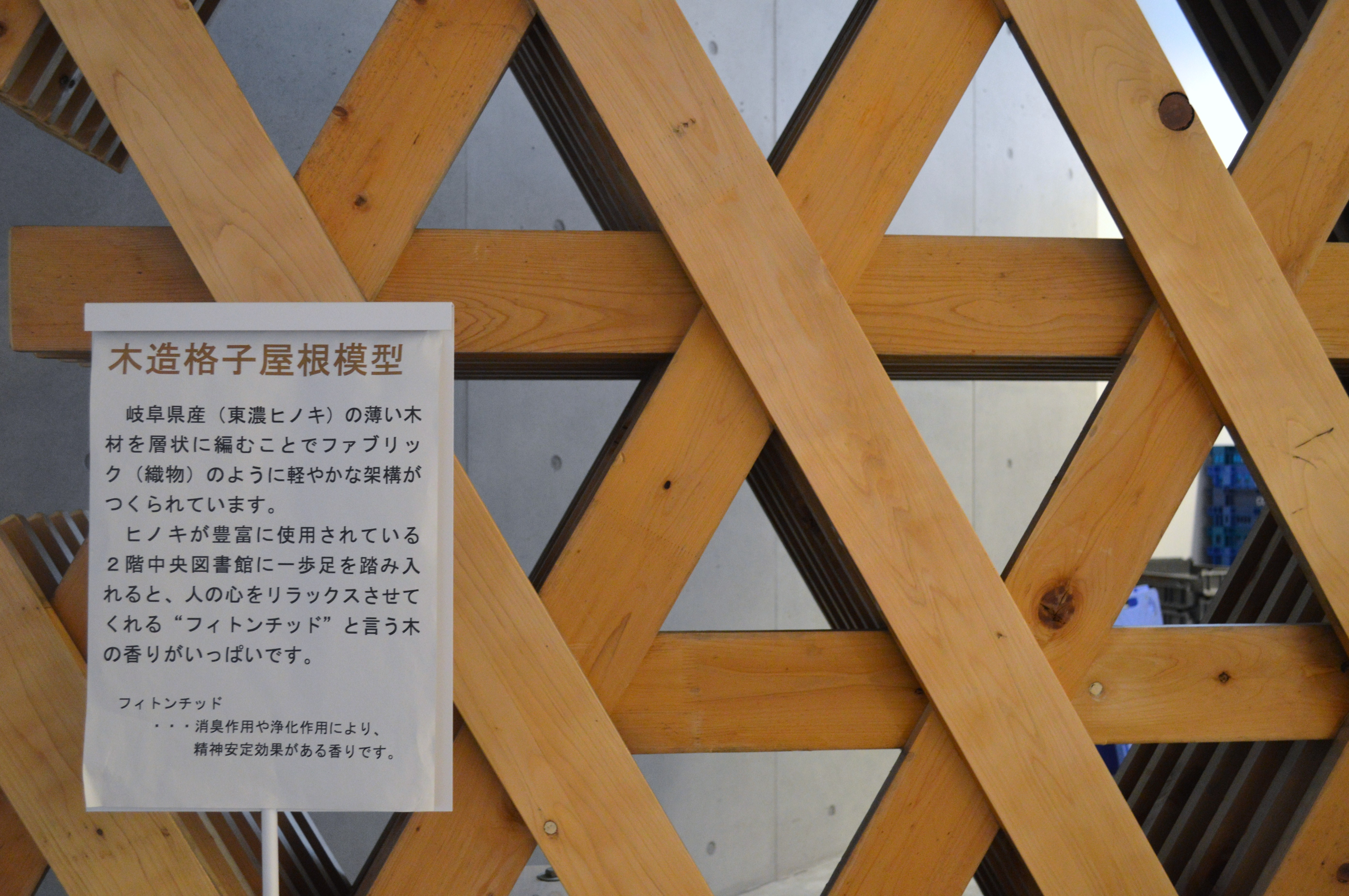 岐阜県岐阜市にあるみんなの森 ぎふメディアコスモス1階。ローソンとスターバックスの間に置かれている、屋根/天井部分の模型。